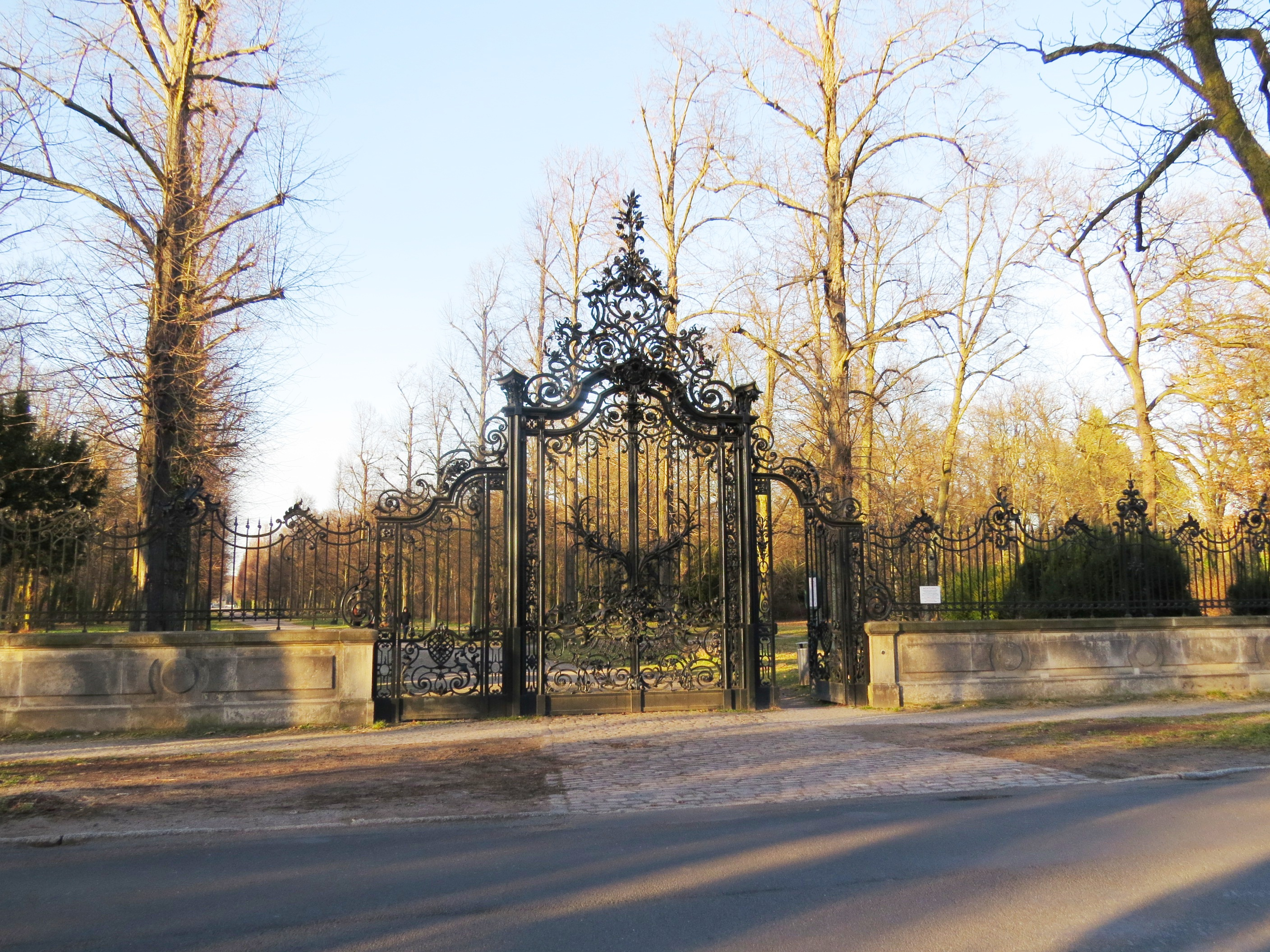 Potsdam, Posttor im Südwesten des Parks Sanssouci